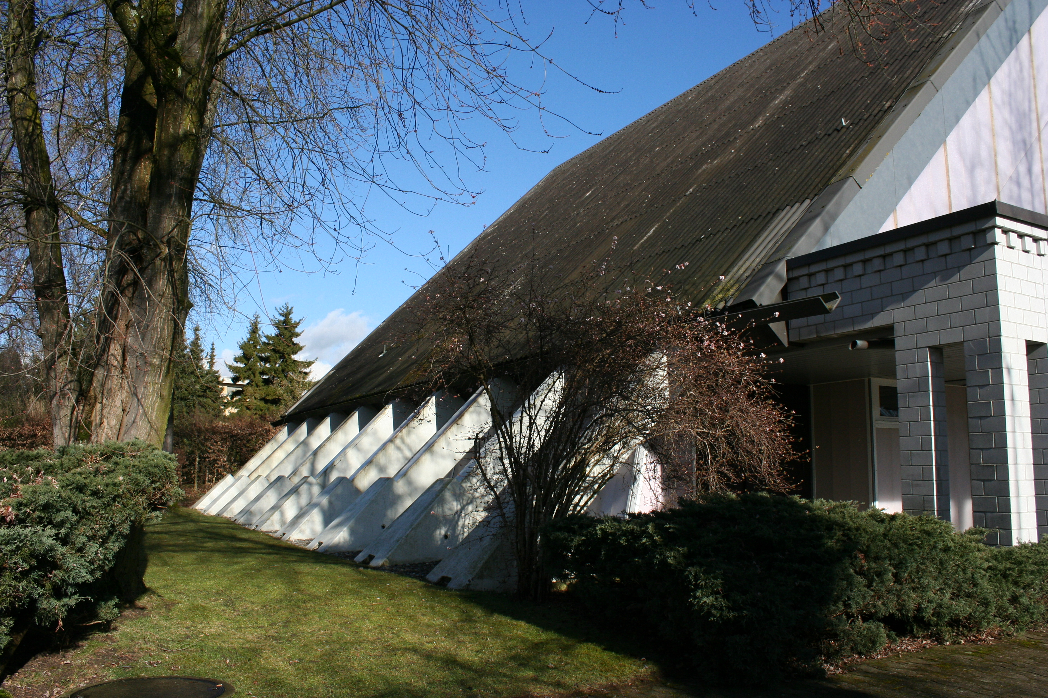 Römisch-katholische Pfarrkirche St. Franziskus Bassersdorf, Betonstreben